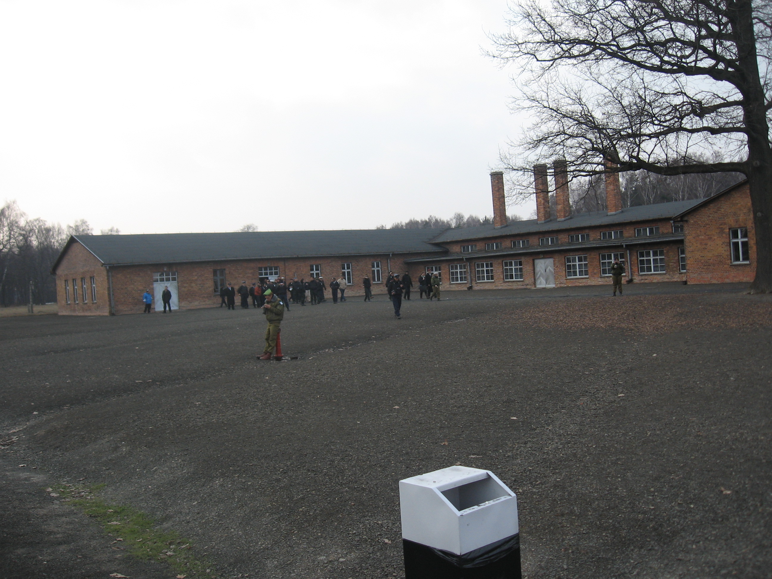 הזאונה באושוויץ כיום